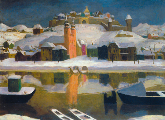 72 x 97 cm, olaj vászon magángyűjtemény